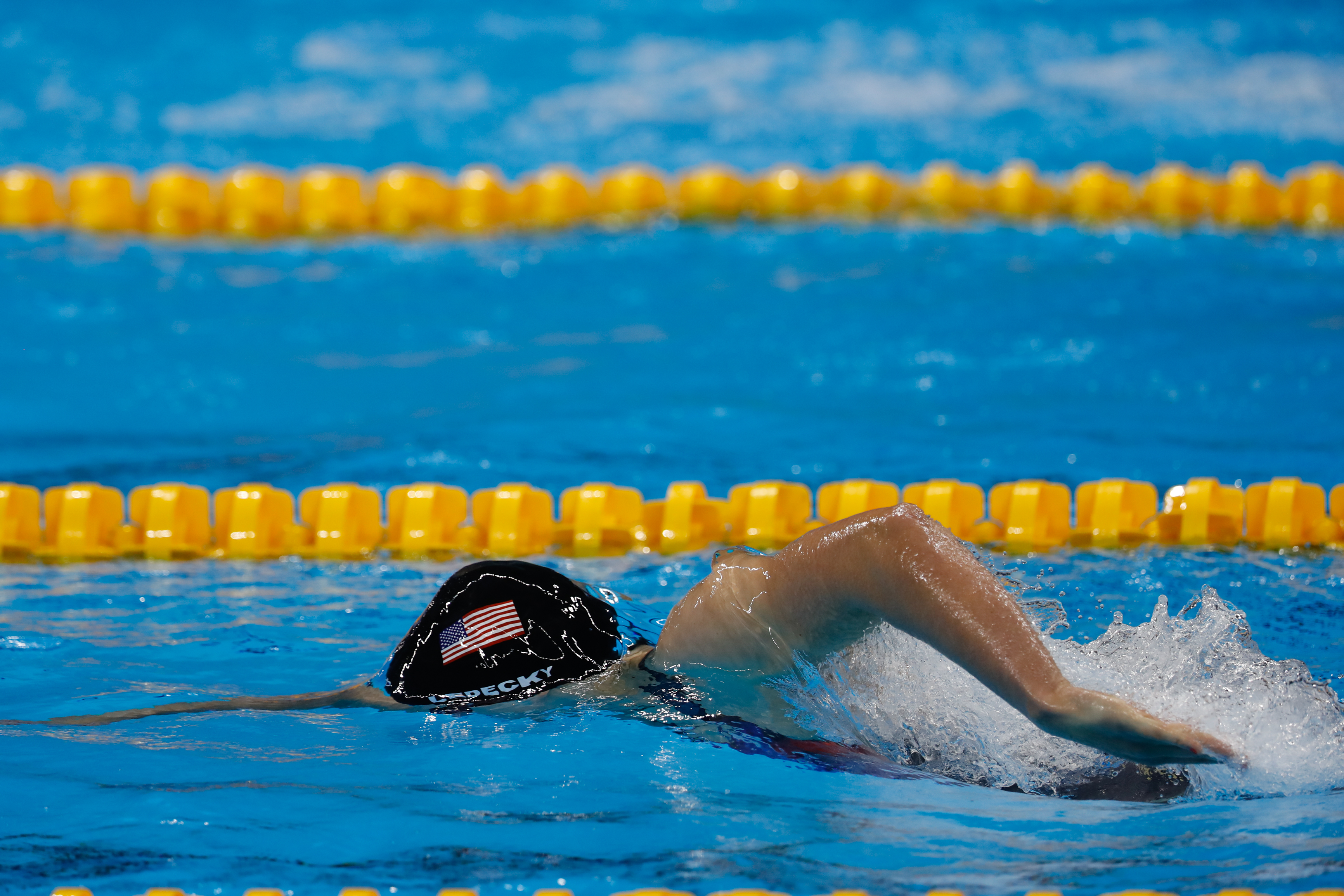 Rio de Janeiro - Nadadora norte-americana Katie Ledecky bate recorde mundial e leva medalha de ouro nos 400m livre nos Jogos Olímpicos Rio 2016 (Fernando Frazão/Agência Brasil)